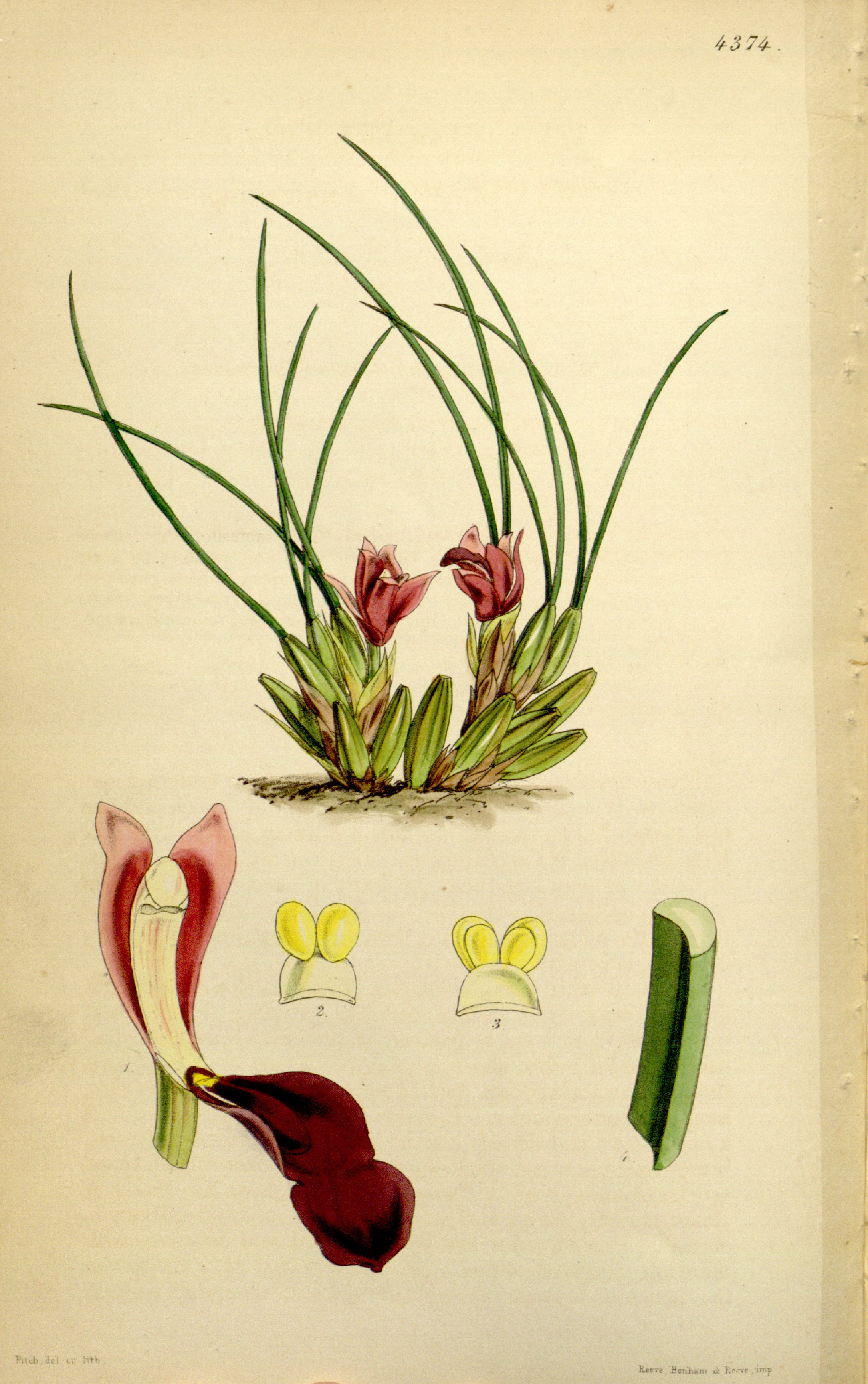 Illustration of Christensonella acicularis